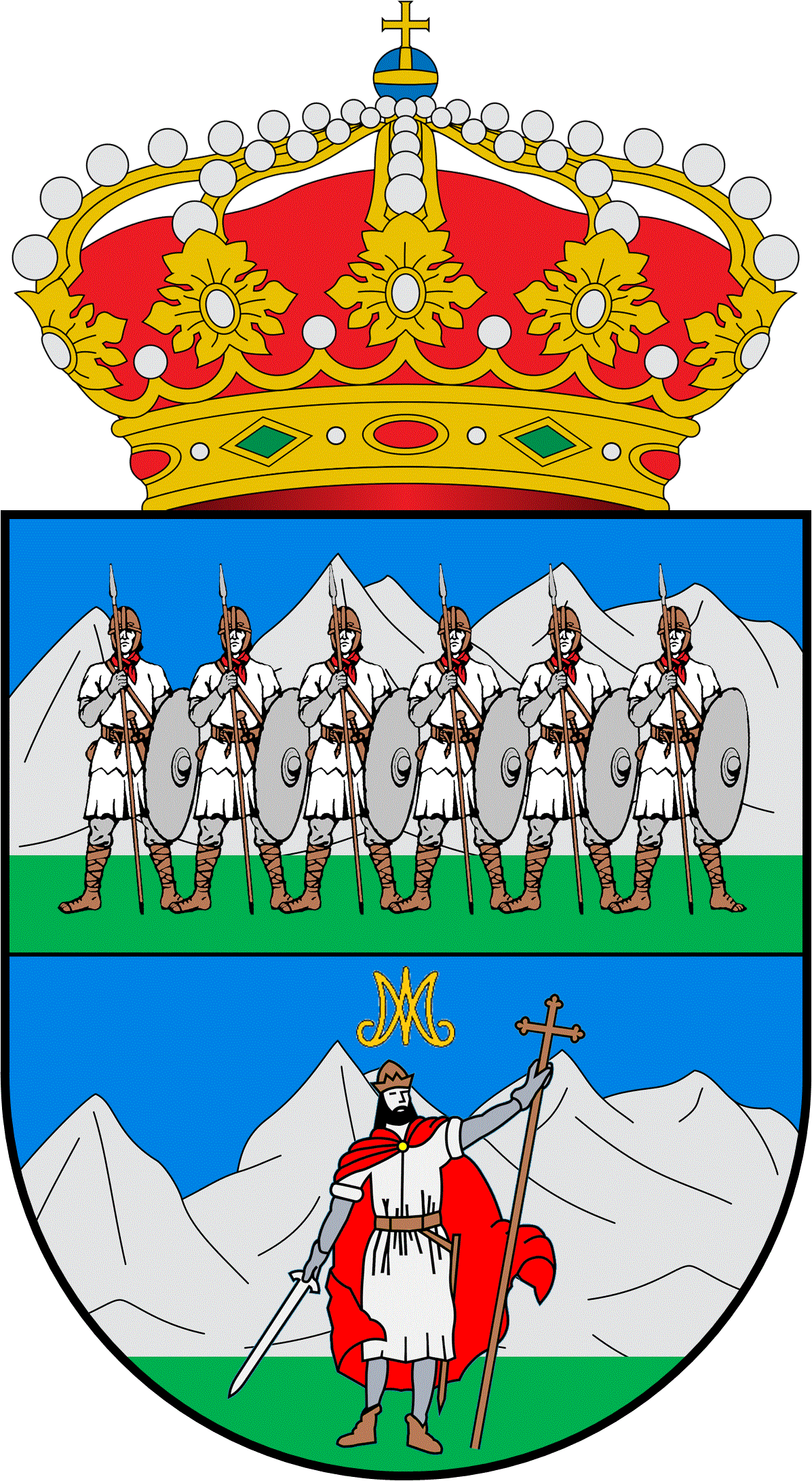 Escudo del concejo Asturiano de Llanera